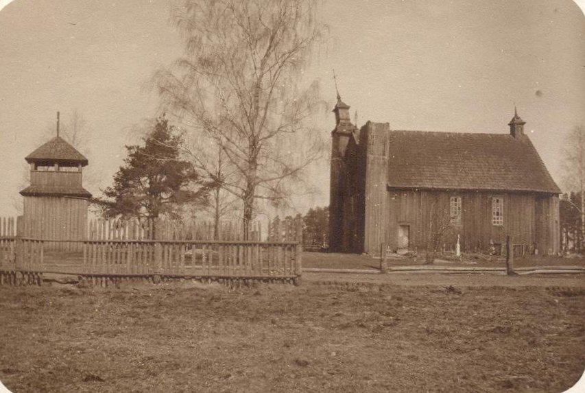 Беларуская (тарашкевіца): Дабромысель (Dabromysiel). Царква Сьвятога Мікалая